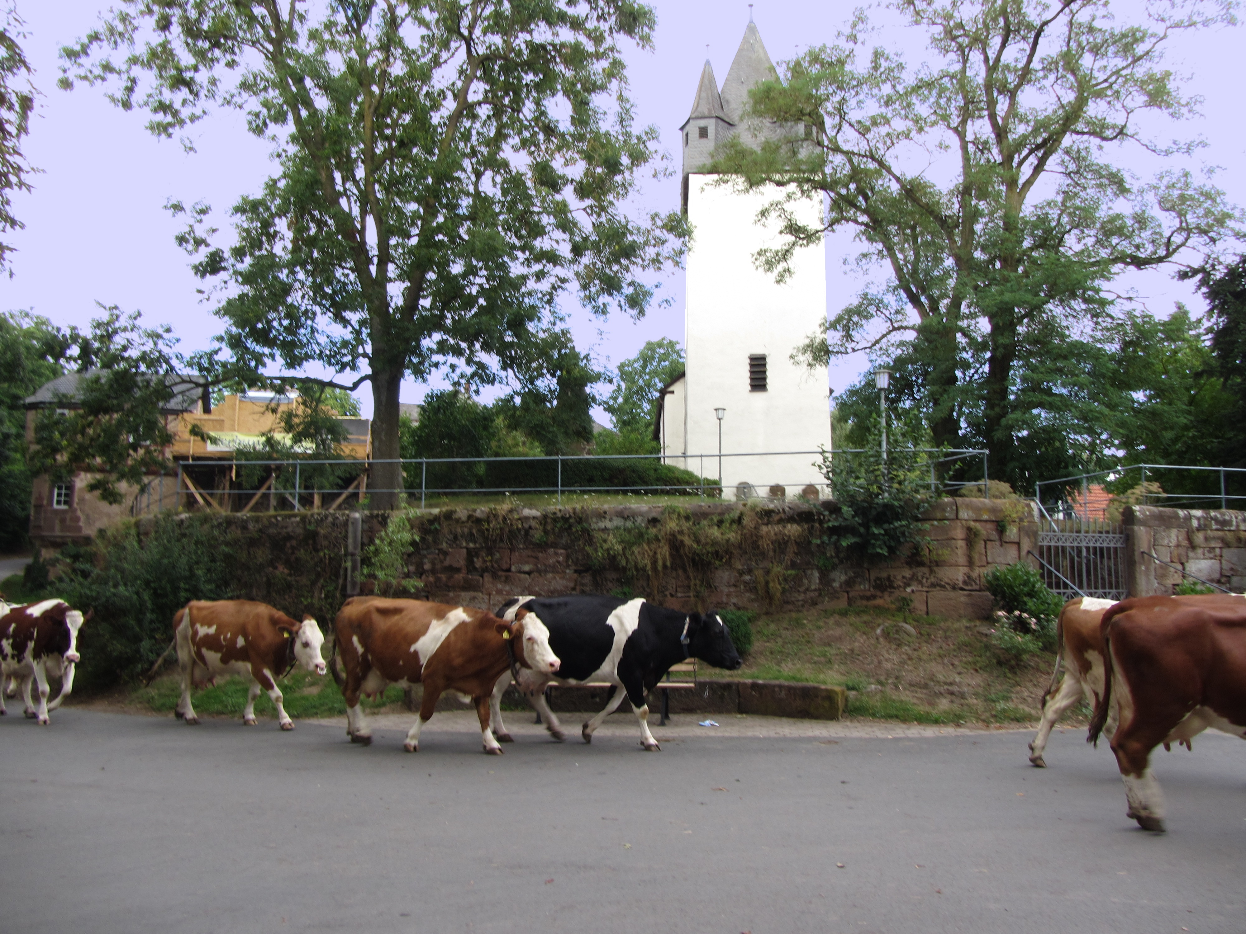 Kirche in Amönau (leider grenzt sich das weiße Mauerwerk der Kirche kaum gegen den Himmel ab; ich bin generell gegen kosmetische Nachbearbeitung, aber hier sollte man vieleicht den Himmel einbläuen). Ganz links im Bild der Rapunzelturm. Etwas rechts neben dem Rapunzelturm die Rückseite einer provisorischen Bühne.